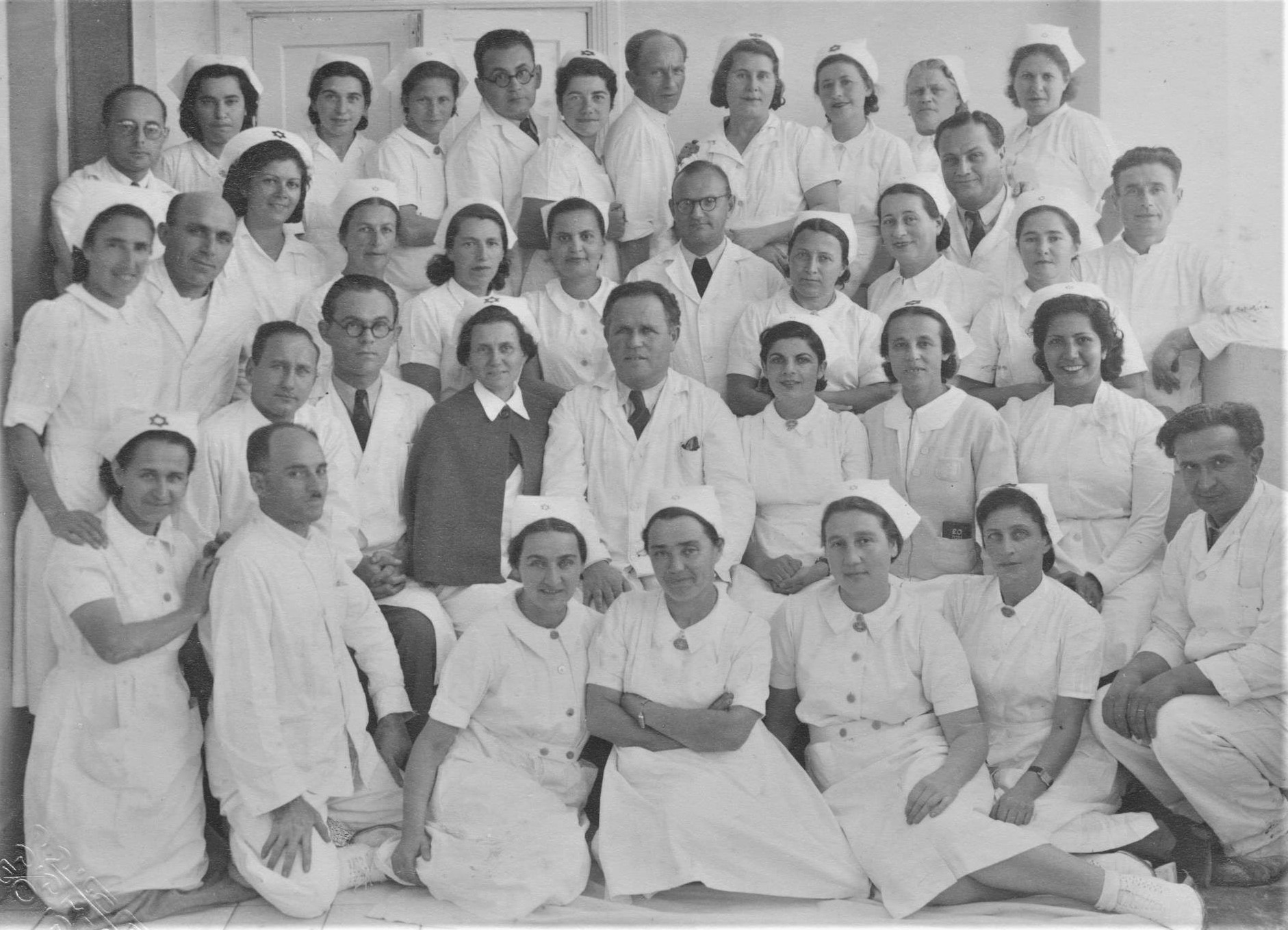 צוות המחקלה הכירורגית בהדסה תל-אביב, חורף 1943